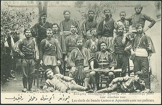 Четите на Гоно Йотов (седнал вдясно) и Апостолис Матопулос (седнал вляво).